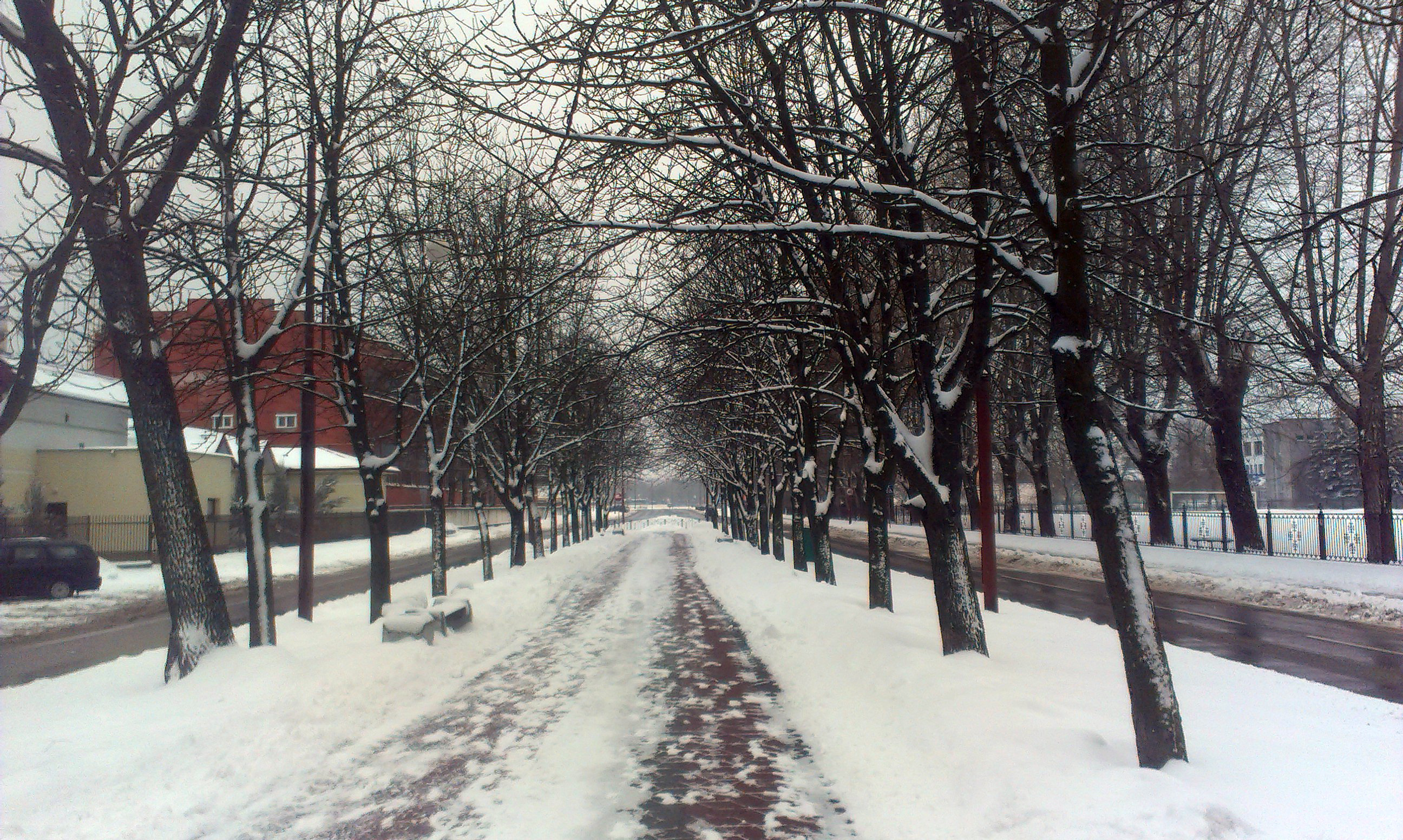 Алея на вул. Гогаля